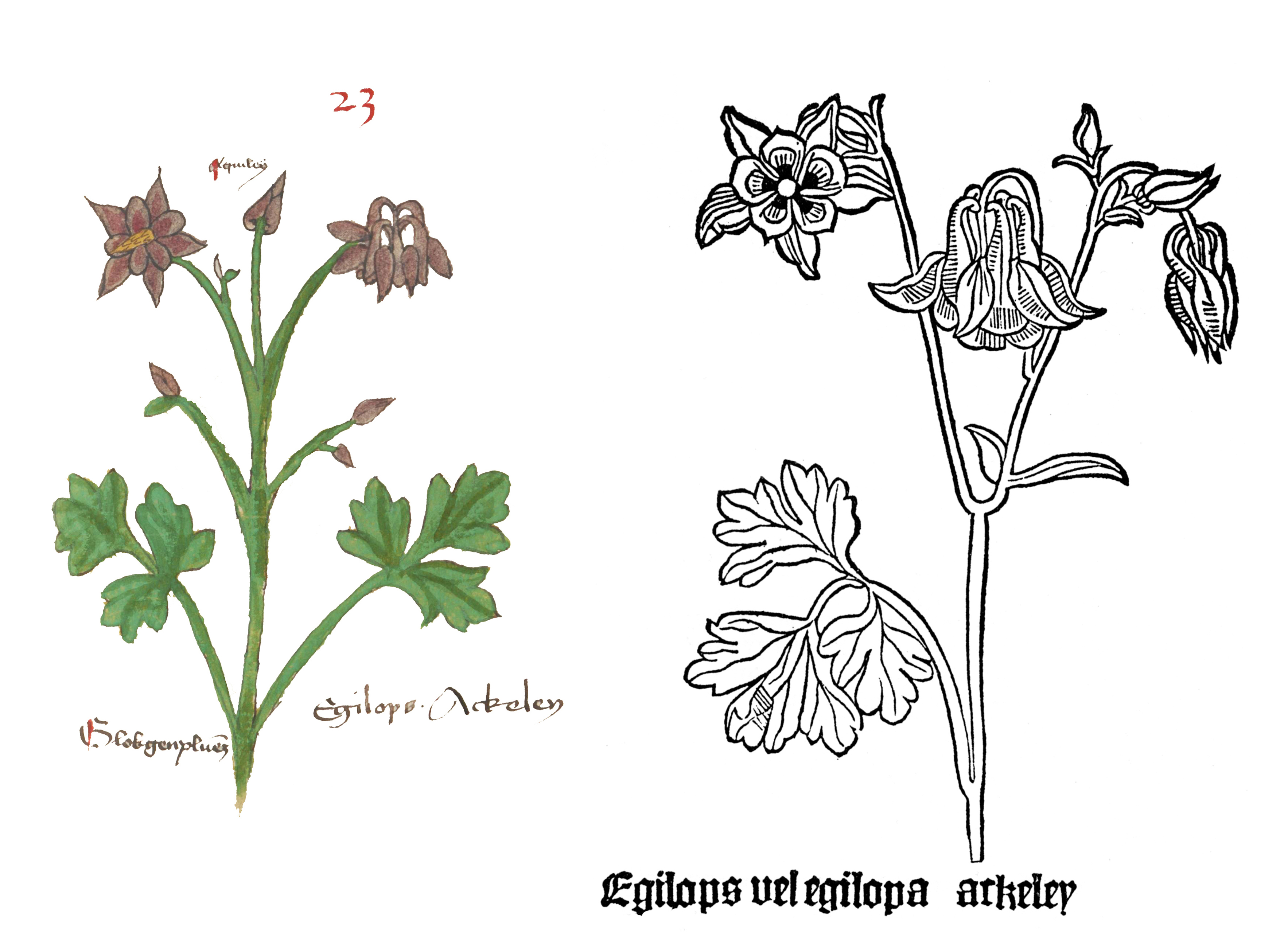 Abbildung von Aquilegia vulgaris